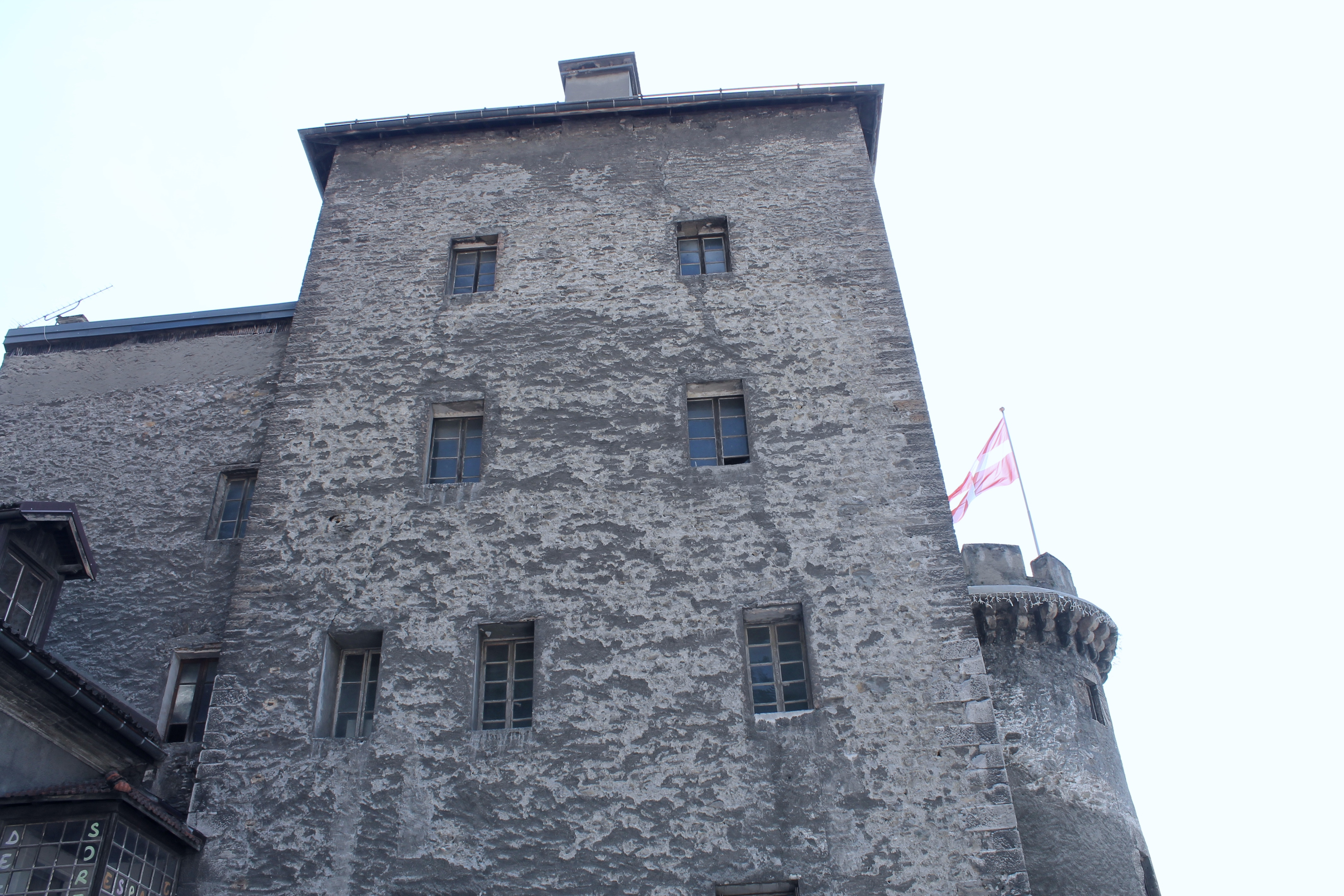 Maison forte d'Aigueblanche (fin du XIIIe siècle). Deux tours, l'une carrée et l'autre ronde, en forme de fer à cheval, contenant l'escalier (été 2018).